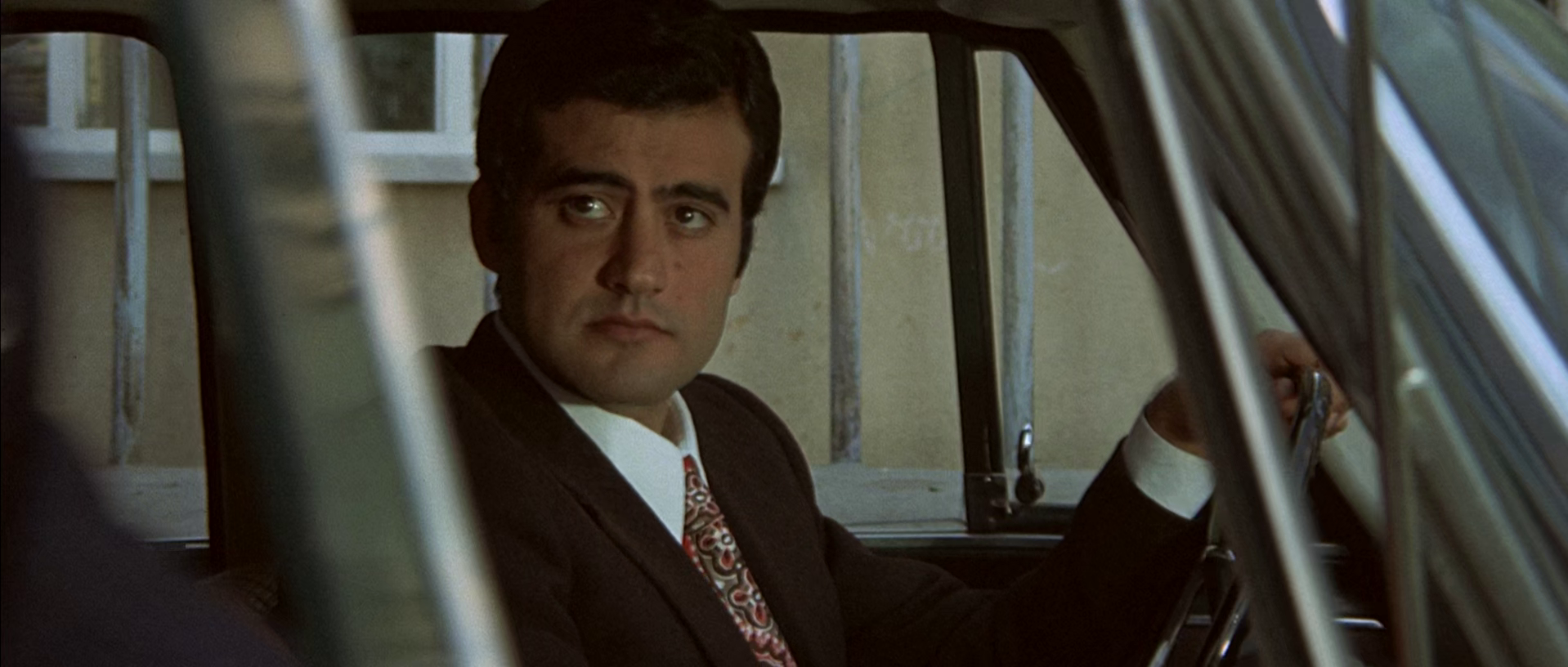 Scena dal film Confessione di un commissario di polizia al procuratore della repubblica (1971)